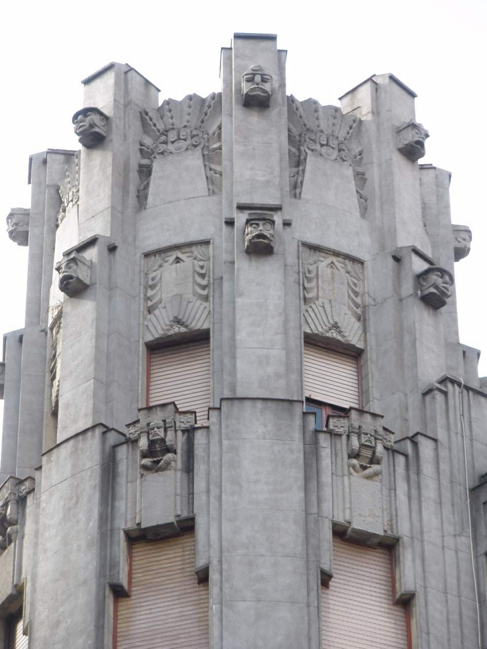 Edificio de estilo art decó en la calle Marqués de San Esteban, 27 (Gijón, Asturias)